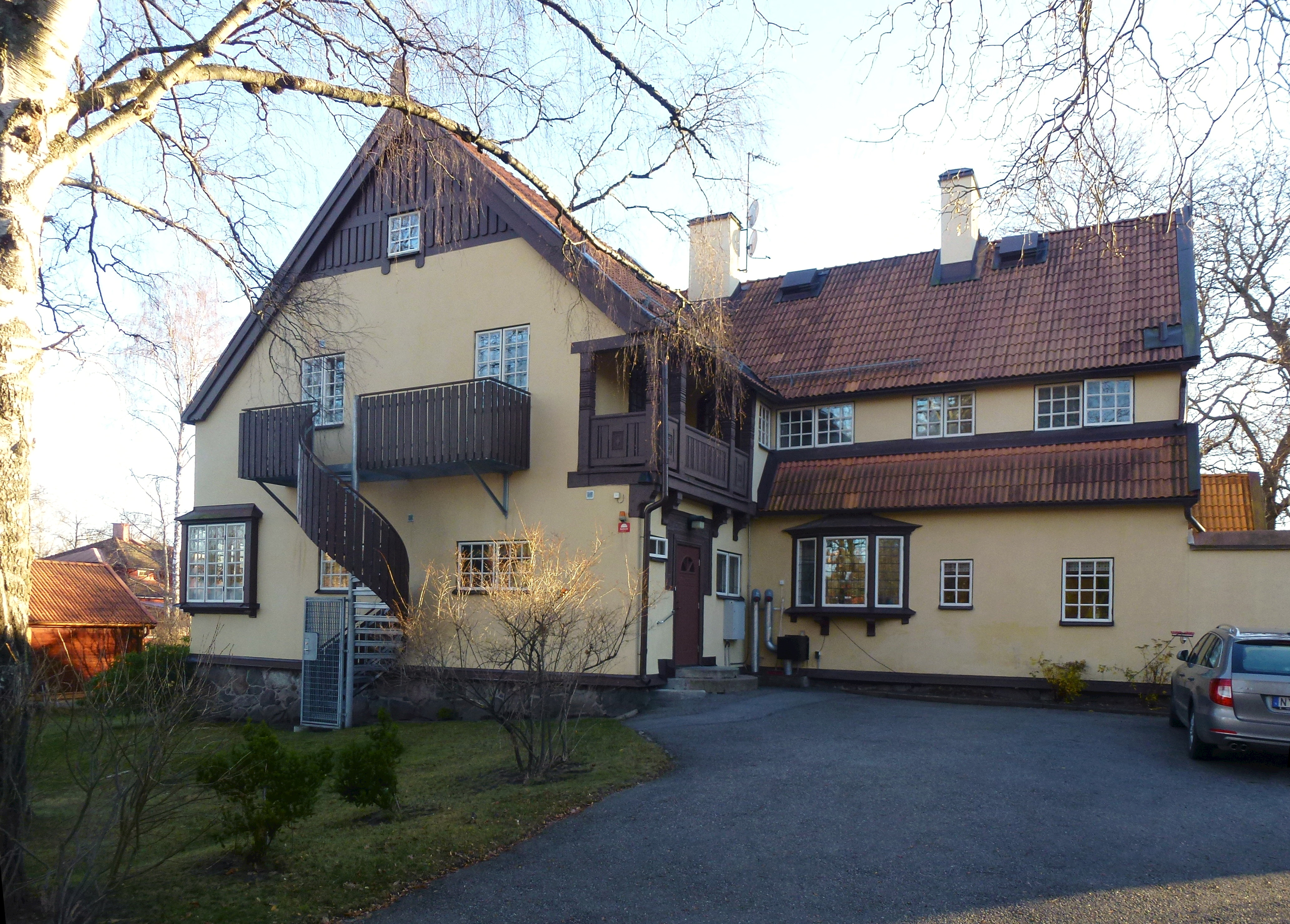 Villa Lidforss, Storängsvägen 6, arkitekt Edvard Bernhard